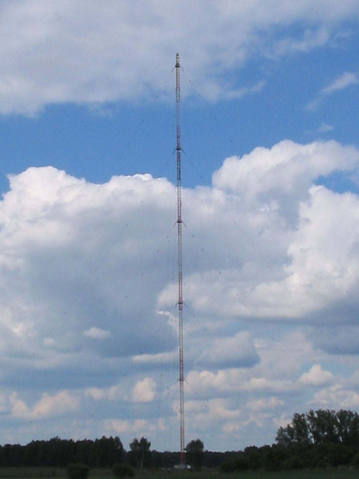 Langwellen-Antenne 177 kHz Zehlendorf, Deutschland im Mai 2004.